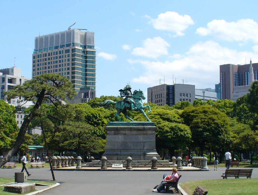 東京都千代田区皇居外苑（皇居前広場）にある楠公（楠正成）銅像広場